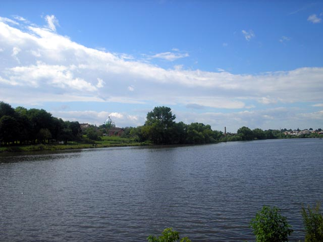 Нічлава у Копичинцях: Річка Нічлава у Копичинцях